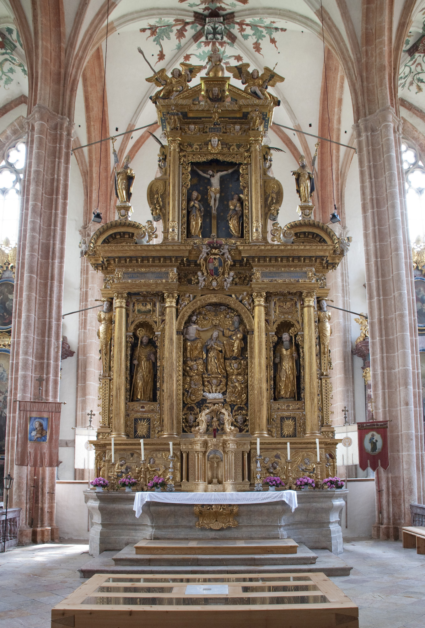 Neuberg an der Mürz, Münster, Hochaltar